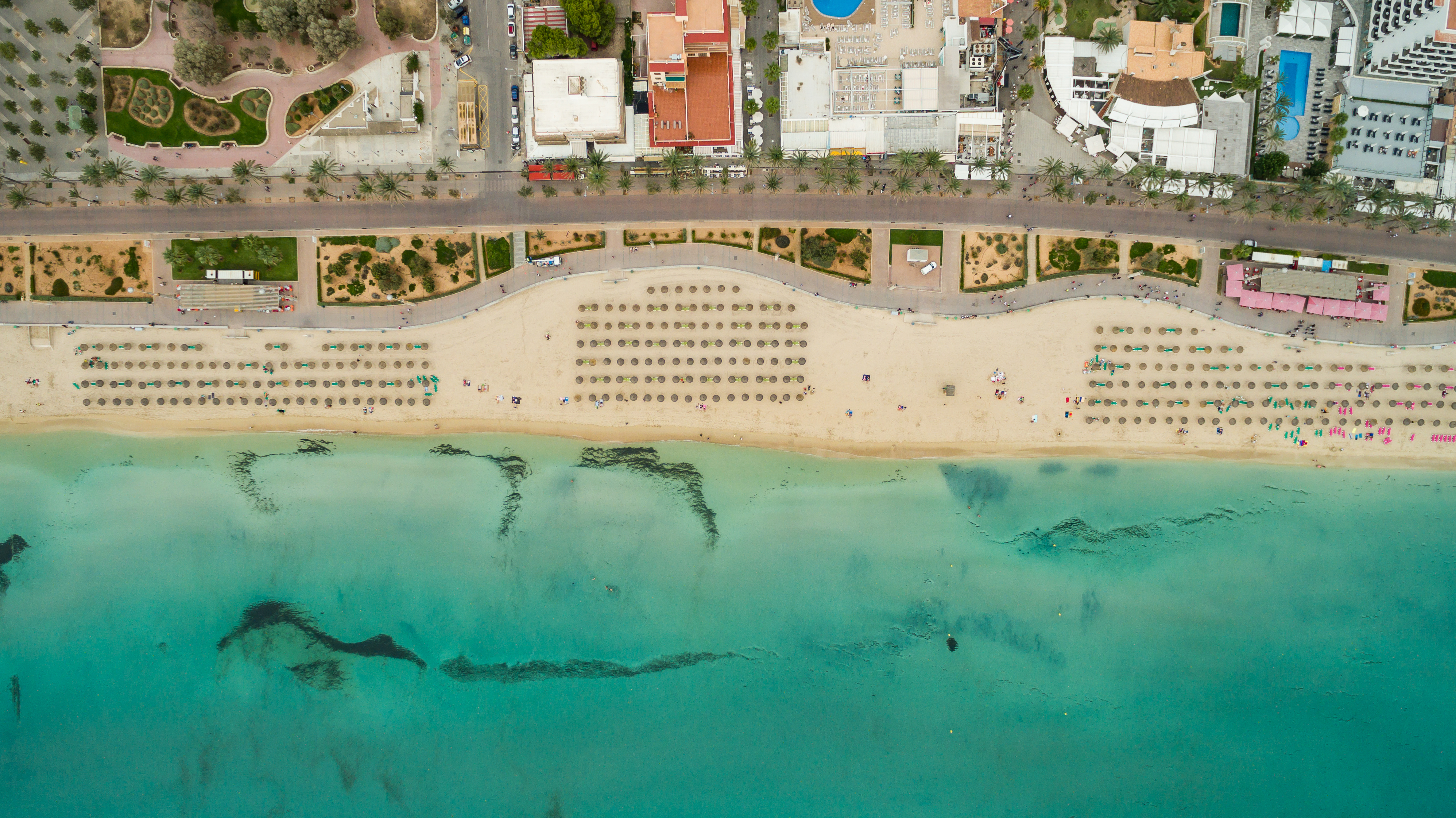 Mallorca S'Arenal beach